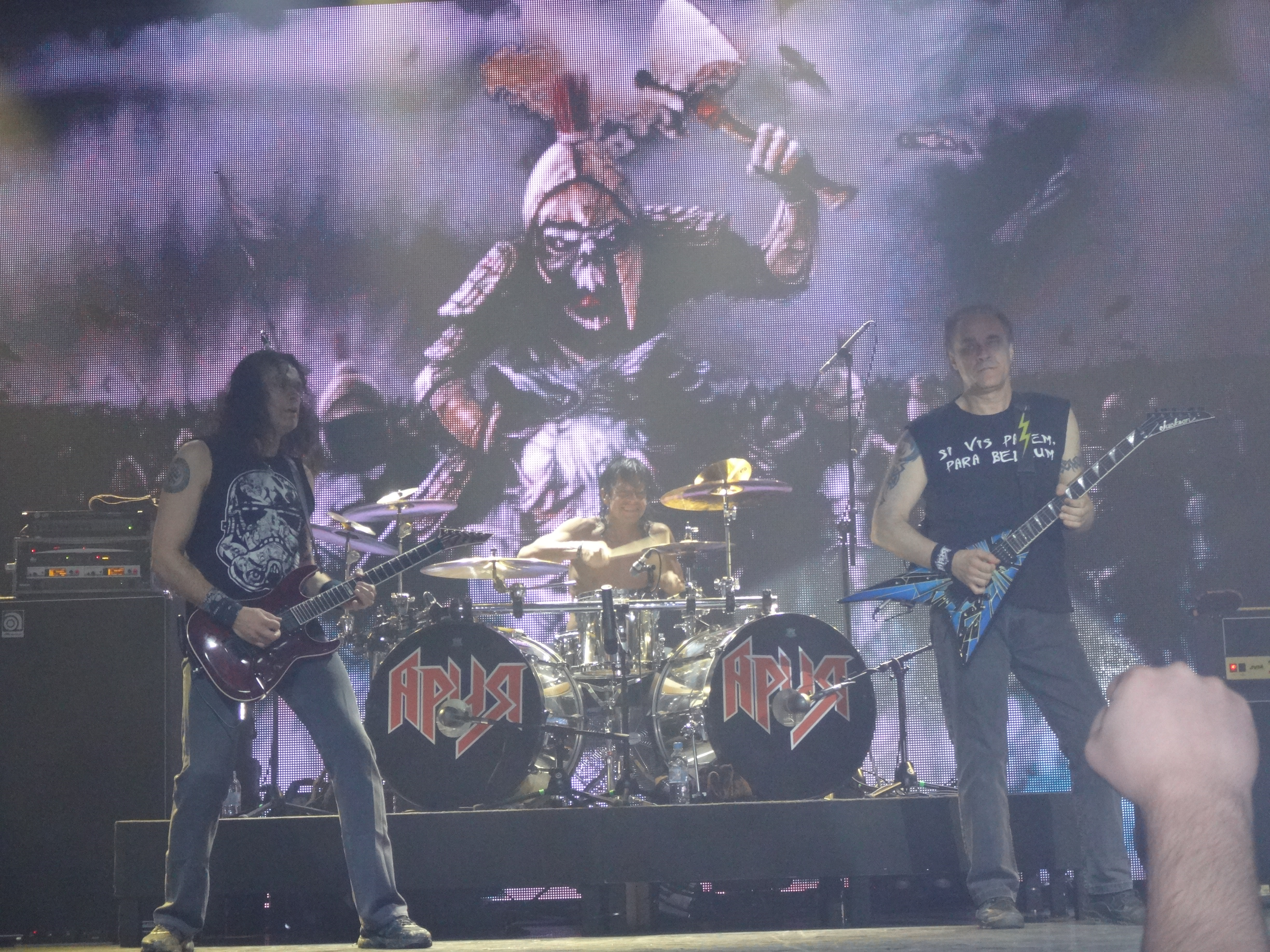 Сергей Попов, Максим Удалов и Владимир Холстинин во время концерта 25.04.2015 в СПб